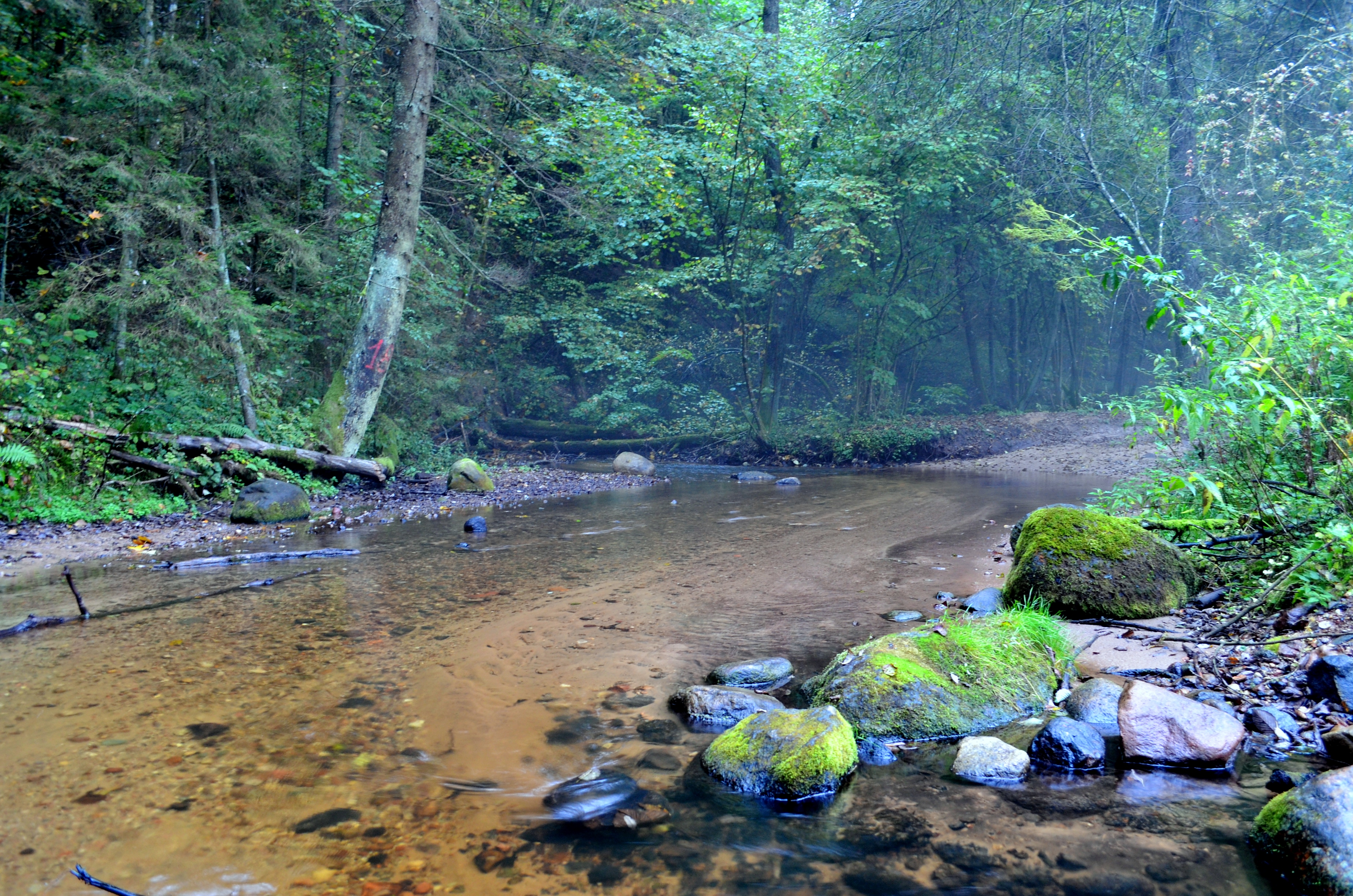 Brasta per Veržuvos upelį, Žemoji Veržuva, Vilnius